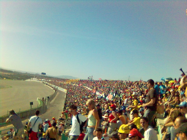 Valencia Ricardo Tormo MotoGP 2006